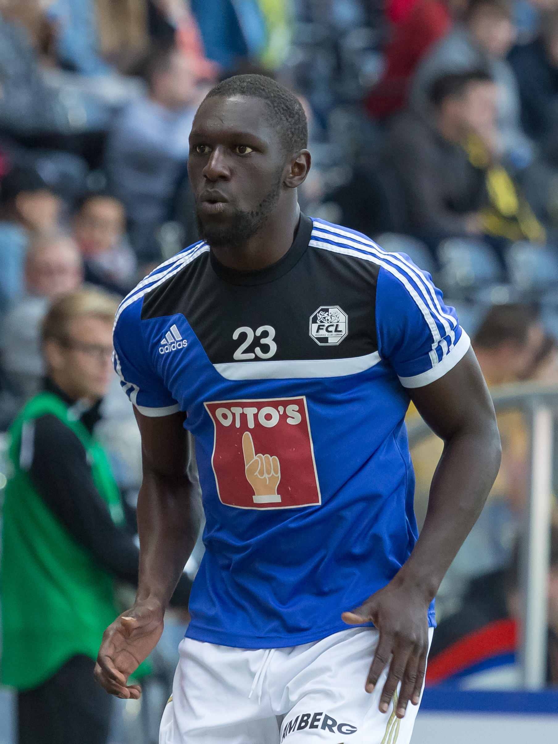 Sally Sarr beim Spiel des BSC Young Boys gegen den FC Luzern